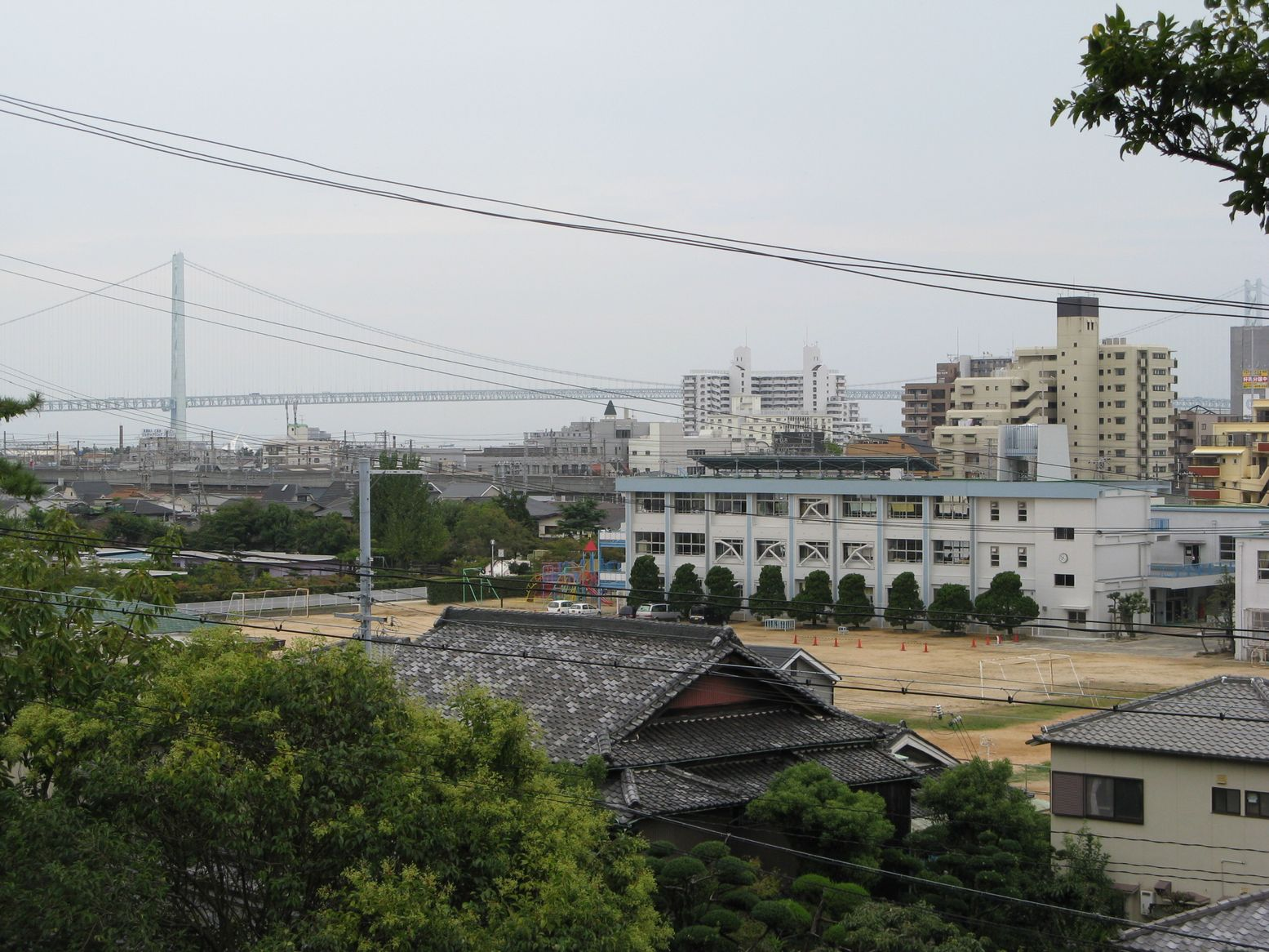 神戸大学発達科学部附属明石小学校 明石公園から南東望